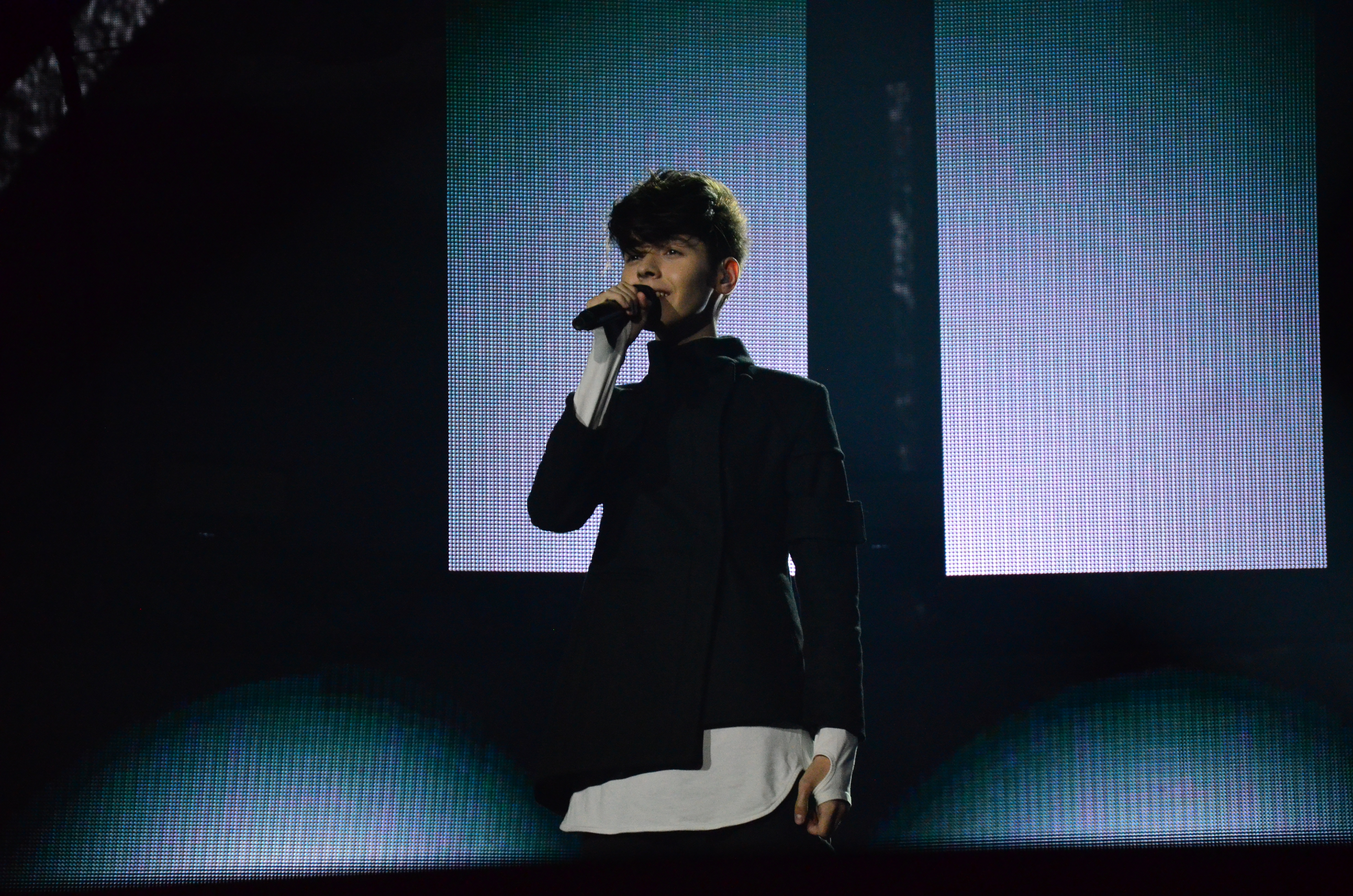 12 травня. Генеральна репетиція фіналу Євробачення 2017. Kristian Kostov (Bulgaria)